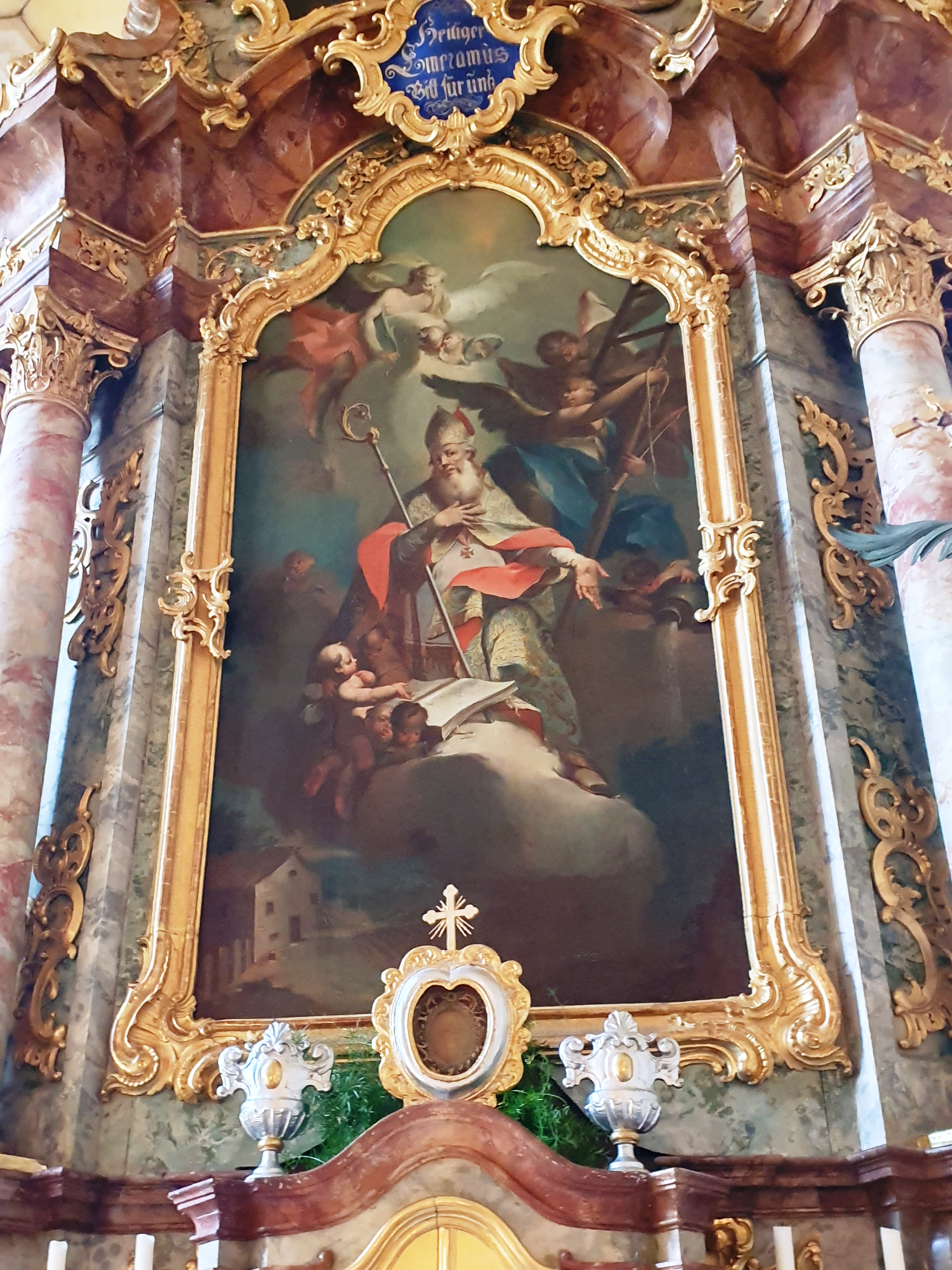 Hochaltarblatt Untereching, darstellend den hl. Emmeram, 1774 gemalt von Franz Xaver König